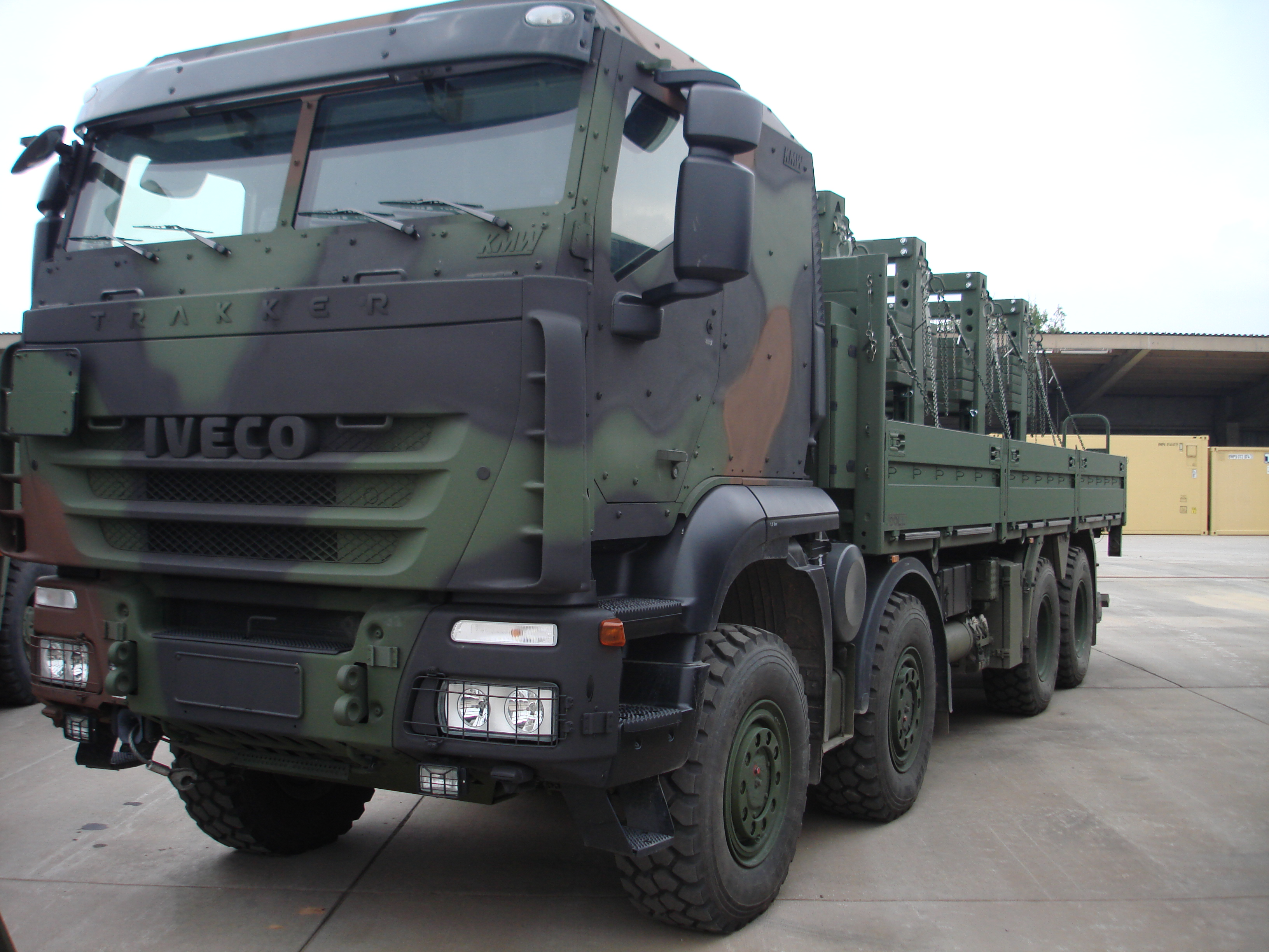 Erprobungsfahrzeug Geschützte Transportfahrzeuge (GTF), 15t-Klasse. Iveco Trakker mit geschützter Fahrgastzelle an der Wehrtechnischen Dienststelle 41. Ausgestellt zum Tag der offenen Tür 2009.